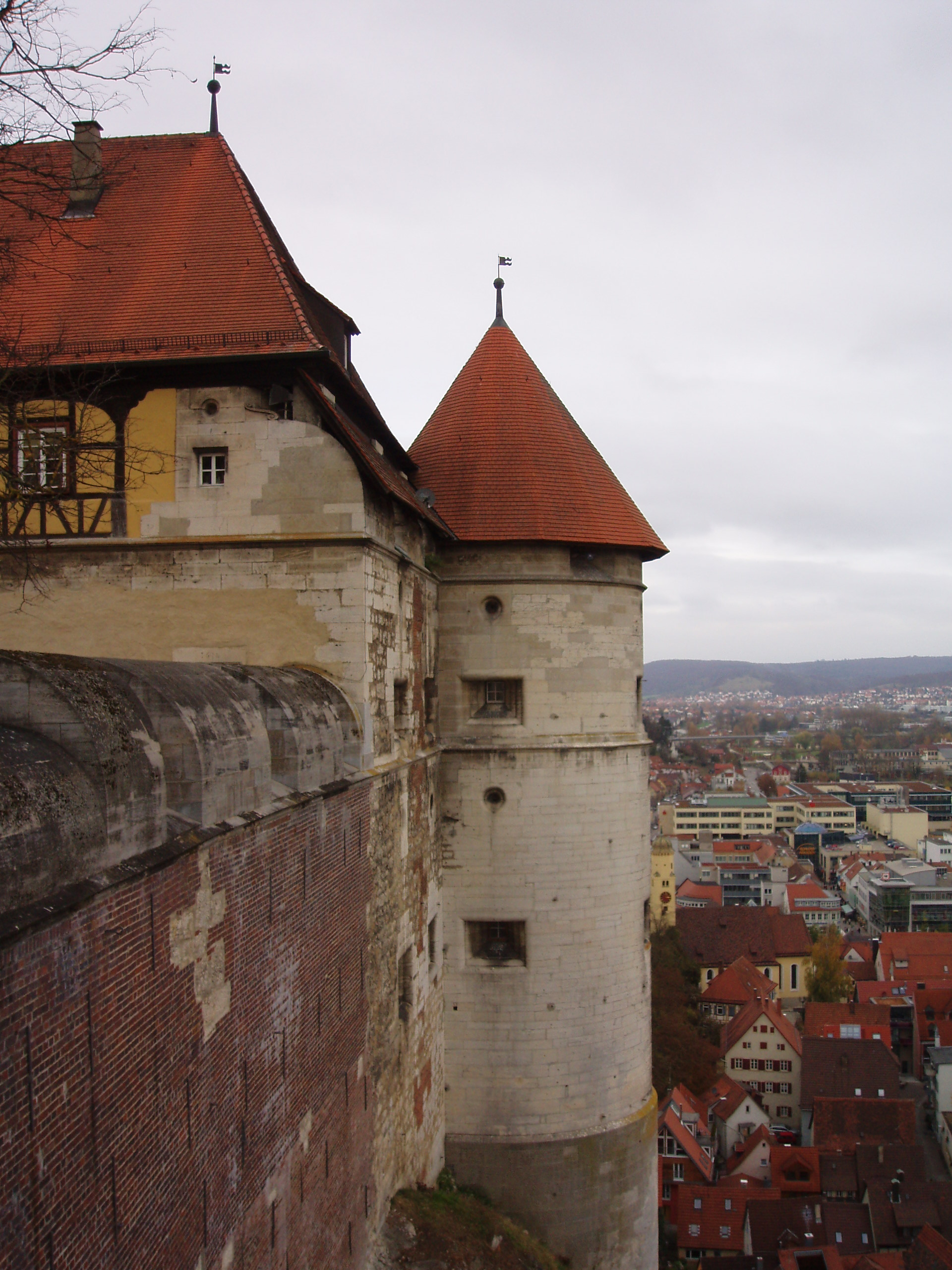 Heidenheim von Schloss Hellenstein